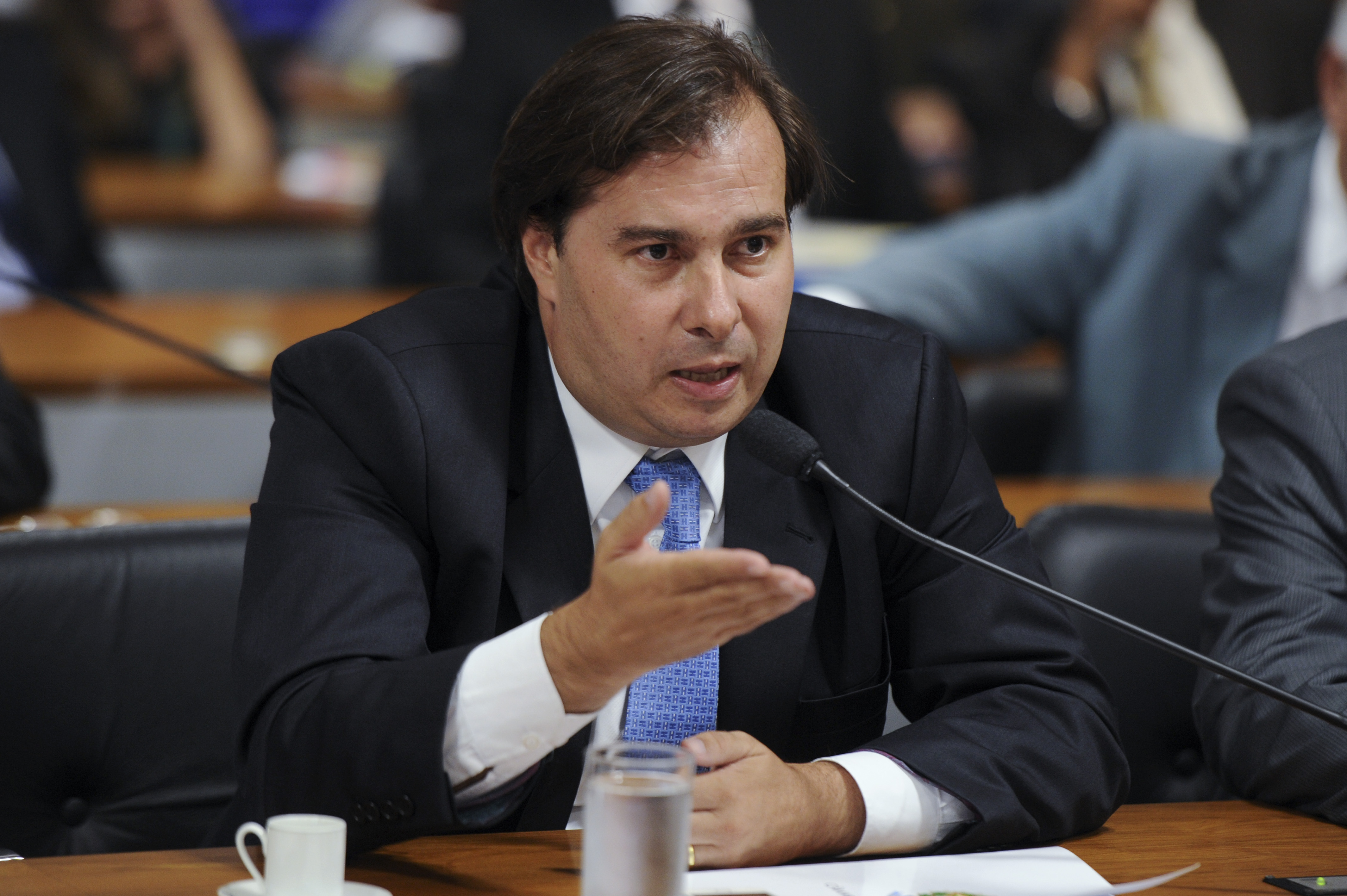 Sala de comissões do Senado Federal durante a Comissão Parlamentar Mista de Inquérito (CPMI) da Petrobras. Na 1ª parte da reunião, serão avaliados requerimentos de convocação de sete autoridades. Em pronunciamento, deputado Rodrigo Maia (DEM-RJ) . Foto: Jefferson Rudy/Agência Senado